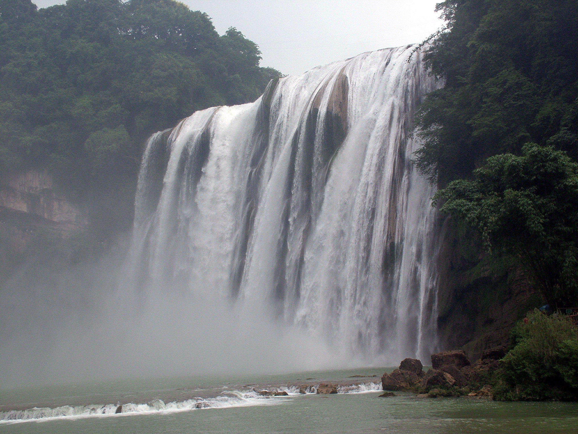 贵州黄果树瀑布侧面观